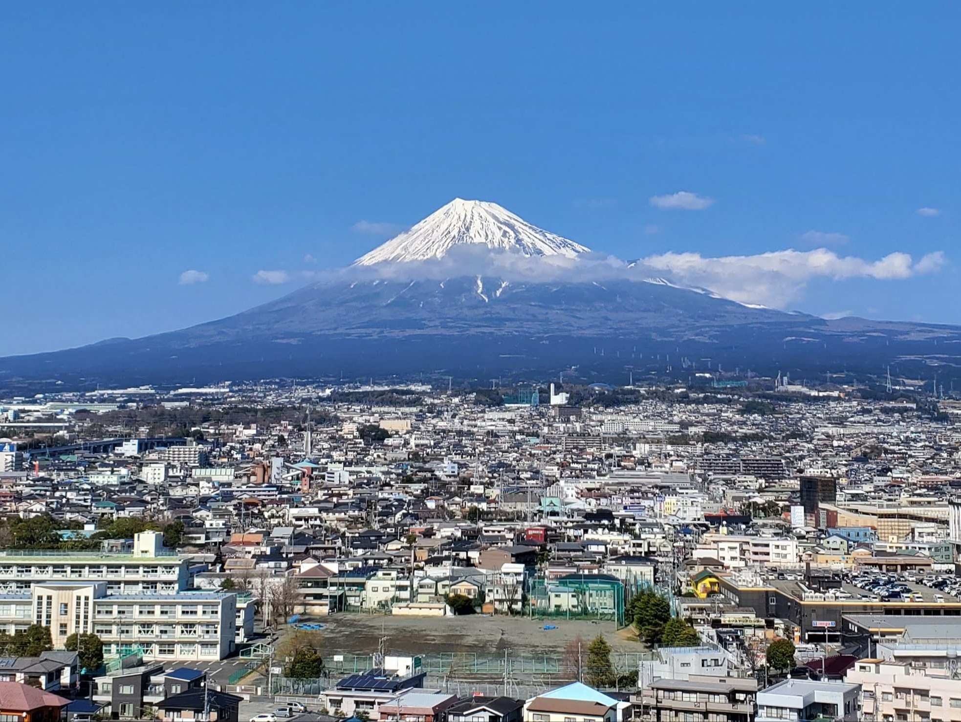 富士市役所屋上から望む富士山